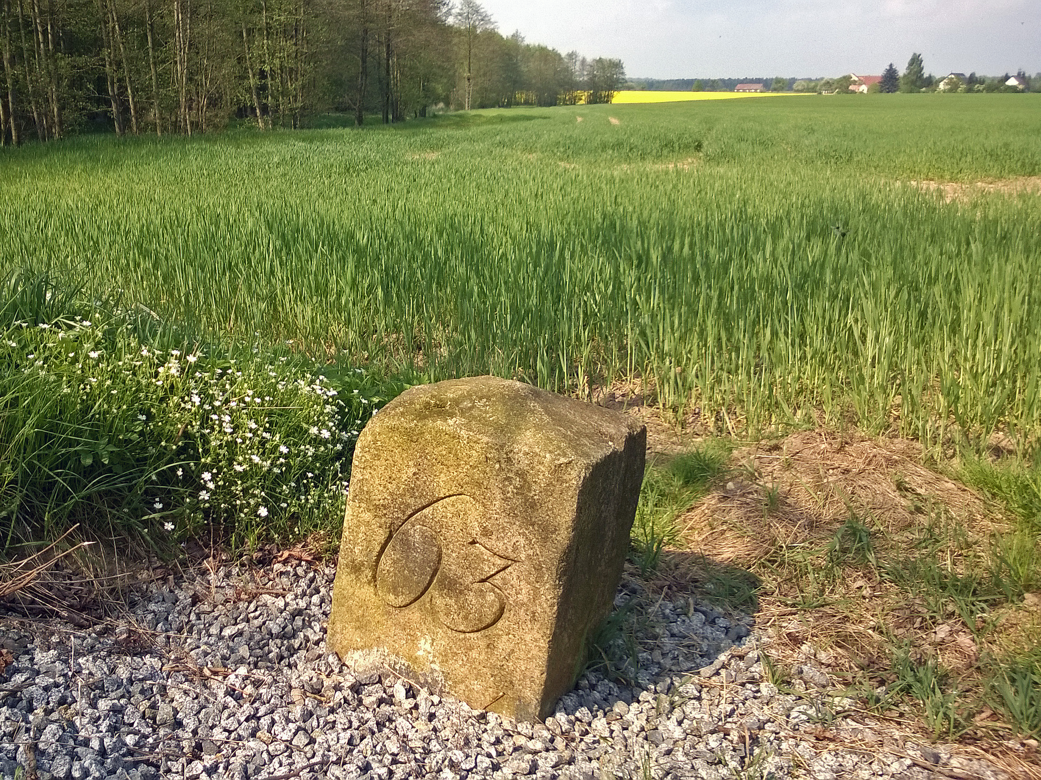 Grenzstein Nr. 63 Historische Landesgrenze Königreich Sachsen Königreich Preußen 1815 (Wiener Kongress) Hornjoserbsce: Historiski saksko-pruski měznik čo. 63 při starym puću wot Borštki do Hrodźišća